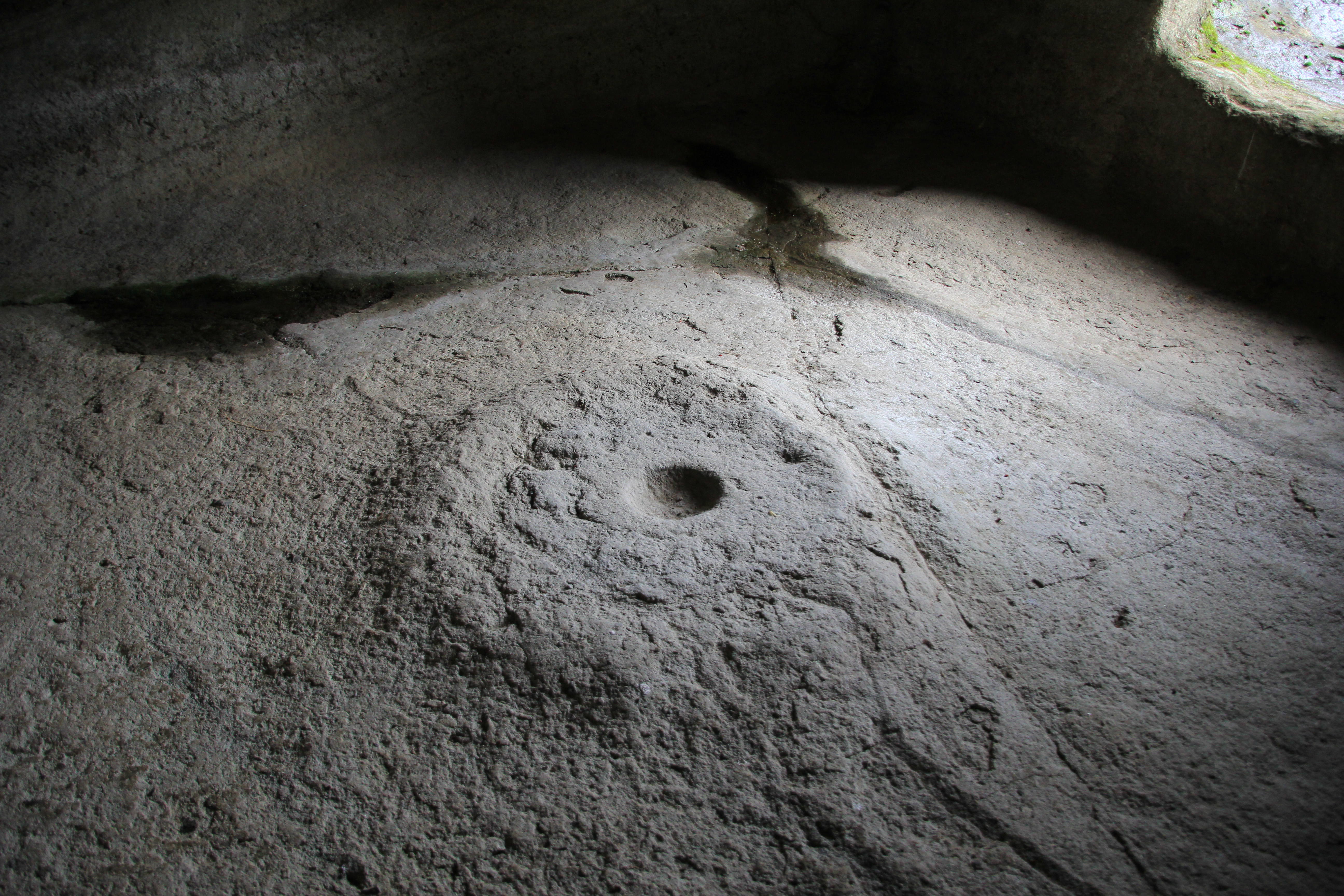 Macomer, necropoli di Filigosa